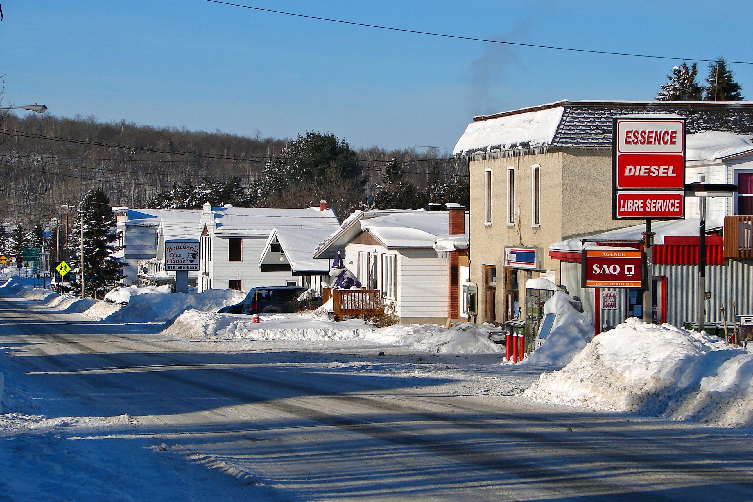 Kiamika, Quebec, Canada